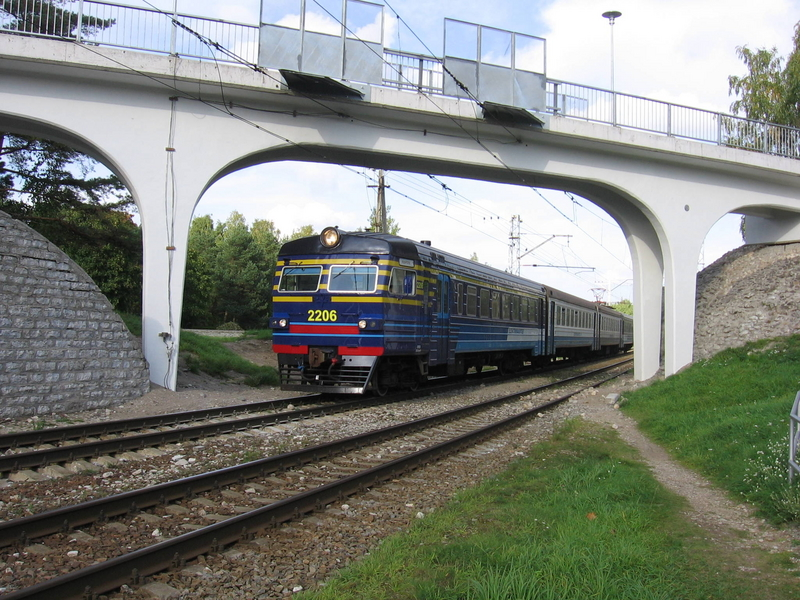 ER12 2206